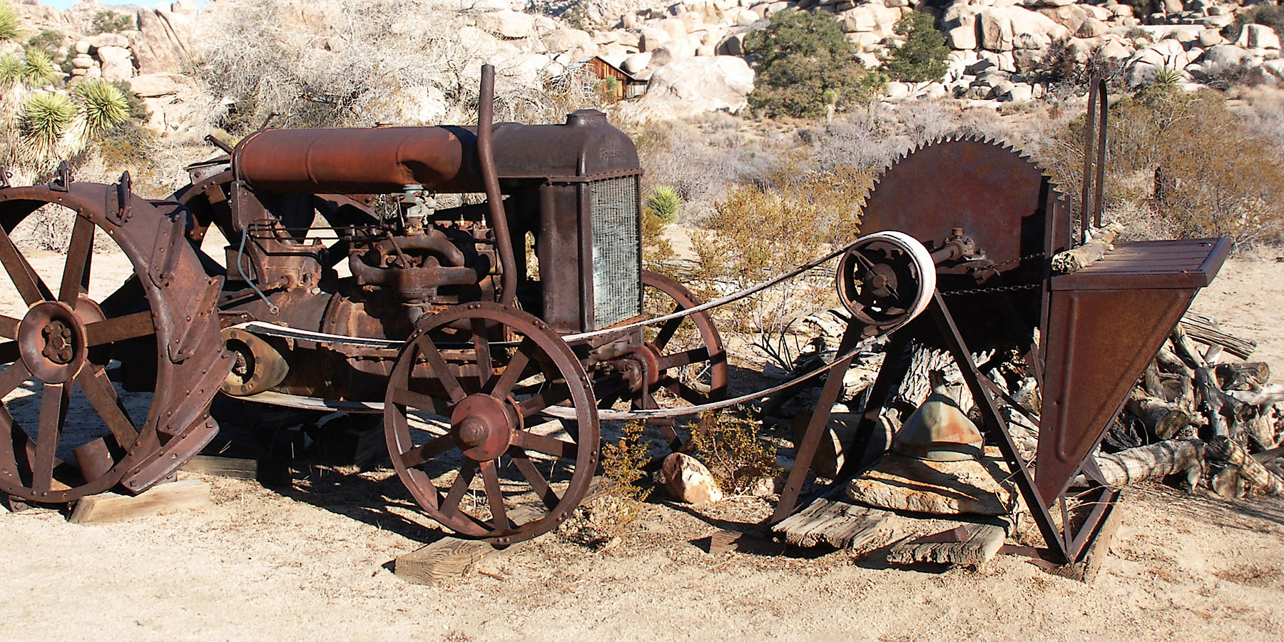 Kreissäge mit Transmissionsriemenantrieb mit Traktor (Fordson Model F)